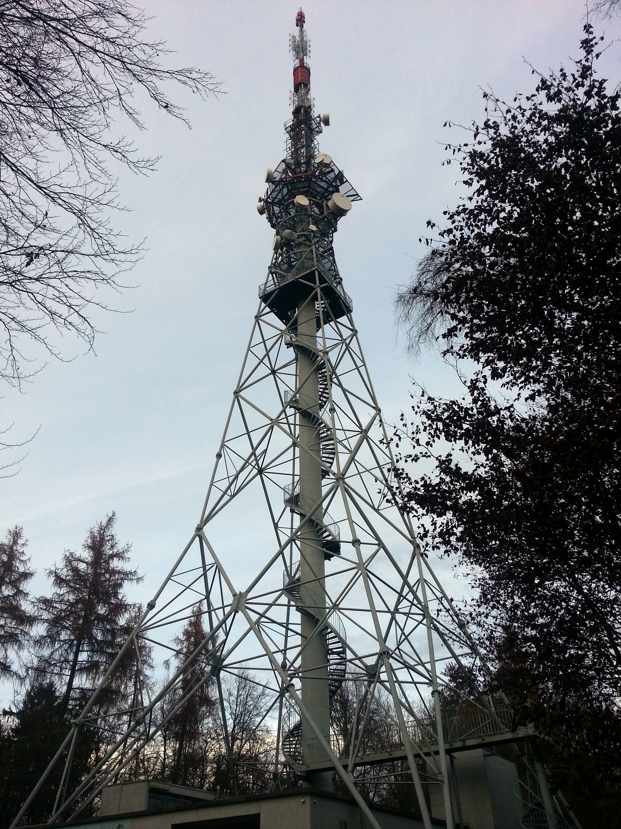 Sendeturm Cholfirst